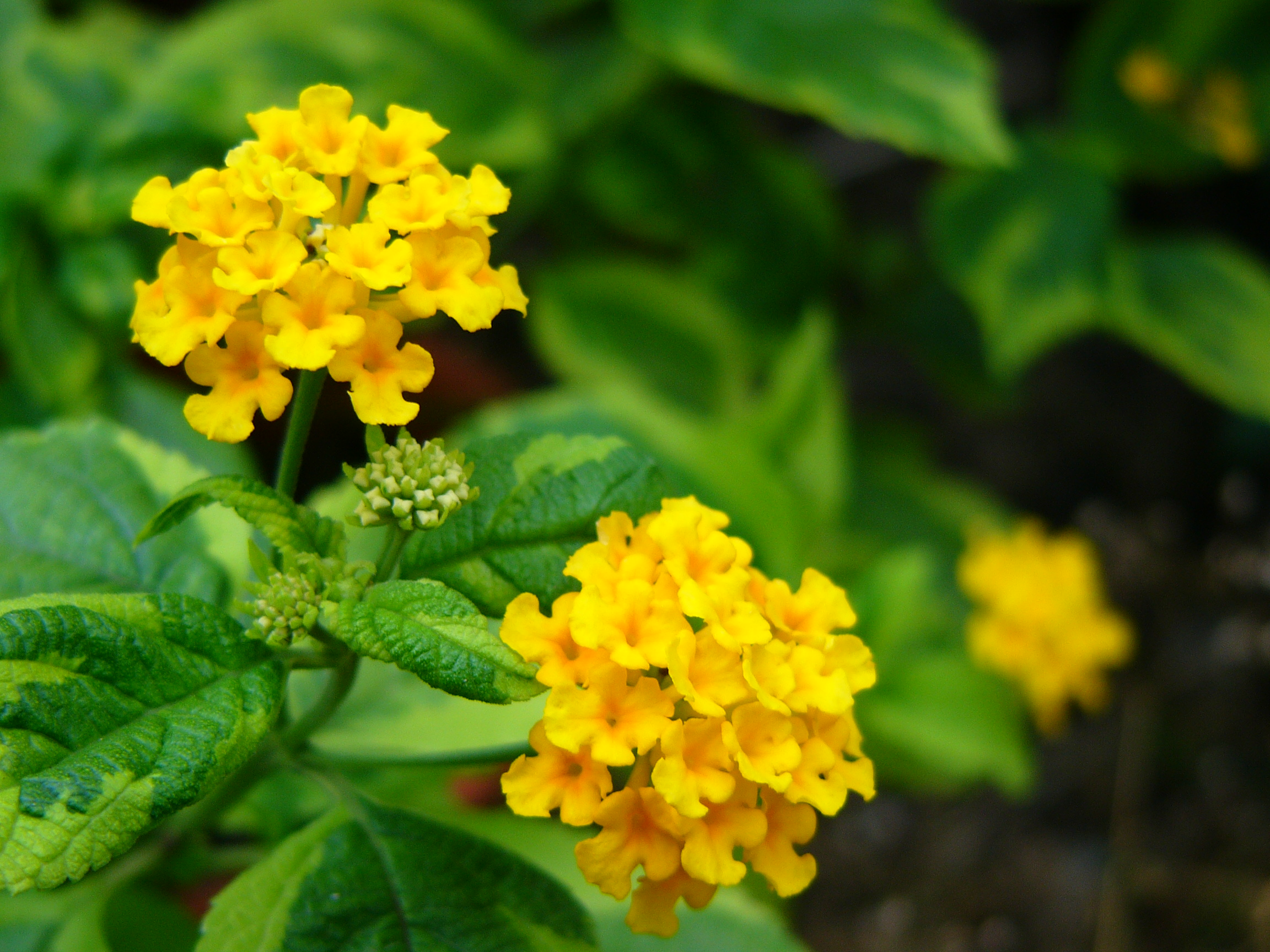 なにが見えたの?